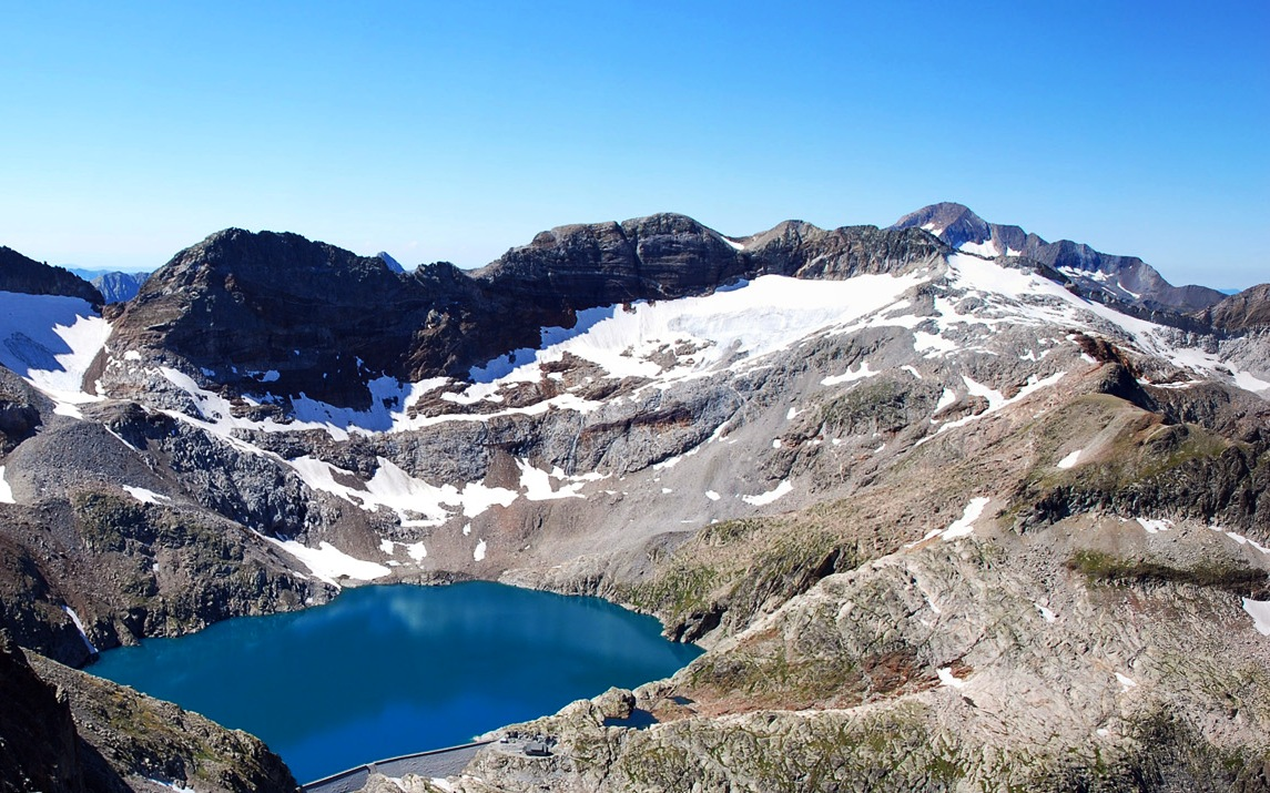 Vue du Cirque du Portillon depuis le pic de Quayrat (debut septembre 2008)